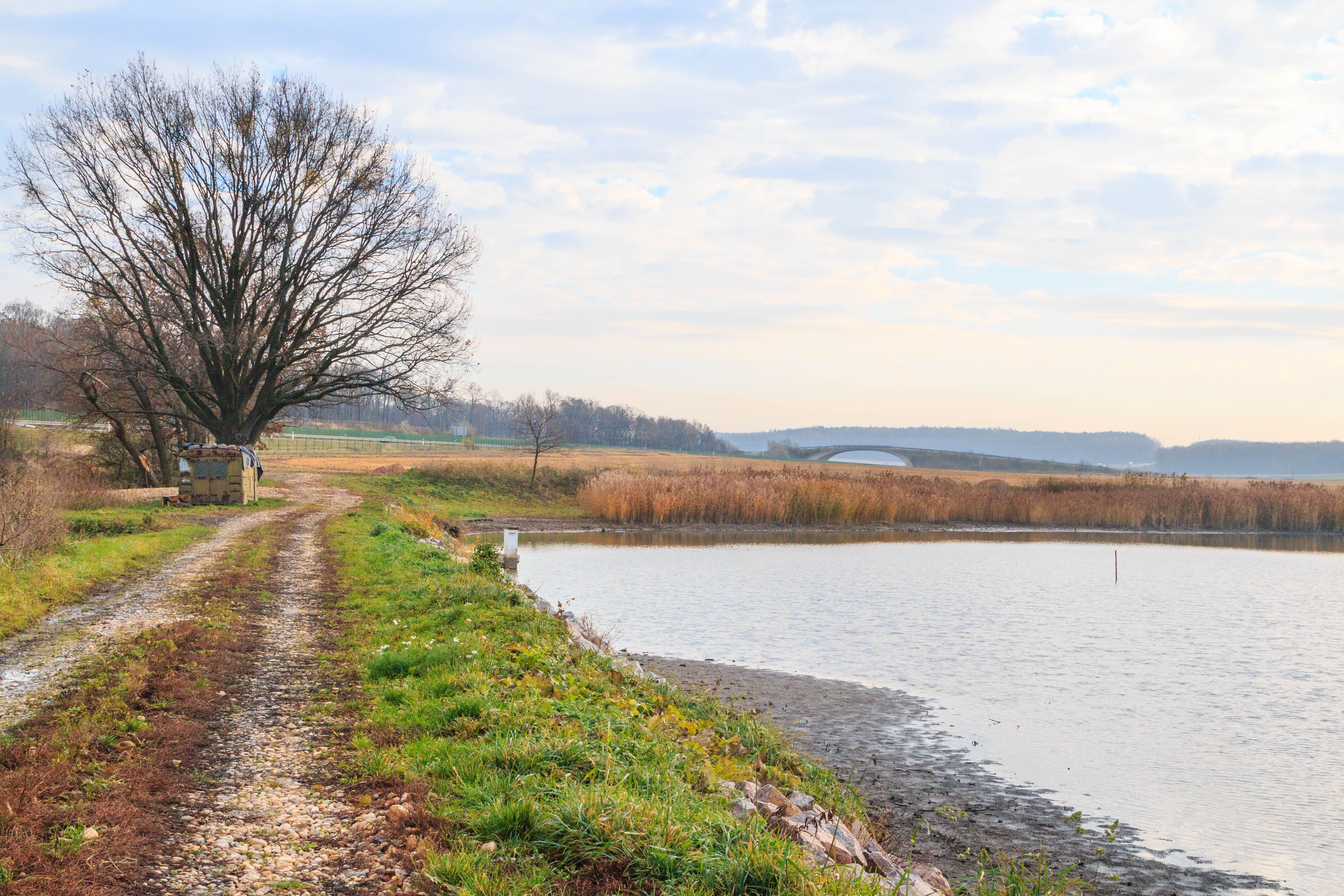 Chýštský rybník Project: Vodstvo